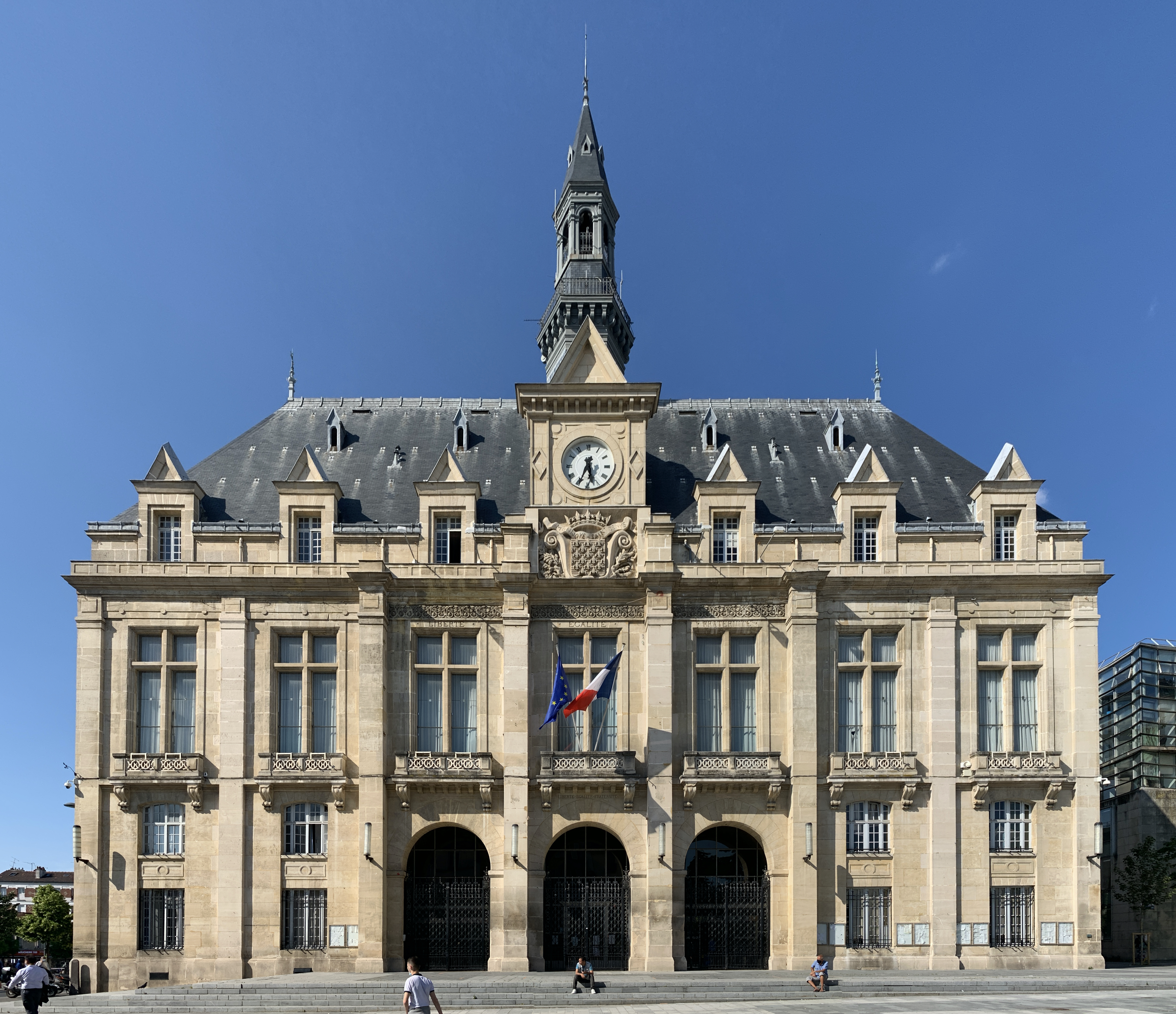 Hôtel de ville de Saint-Denis, Seine-Saint-Denis.